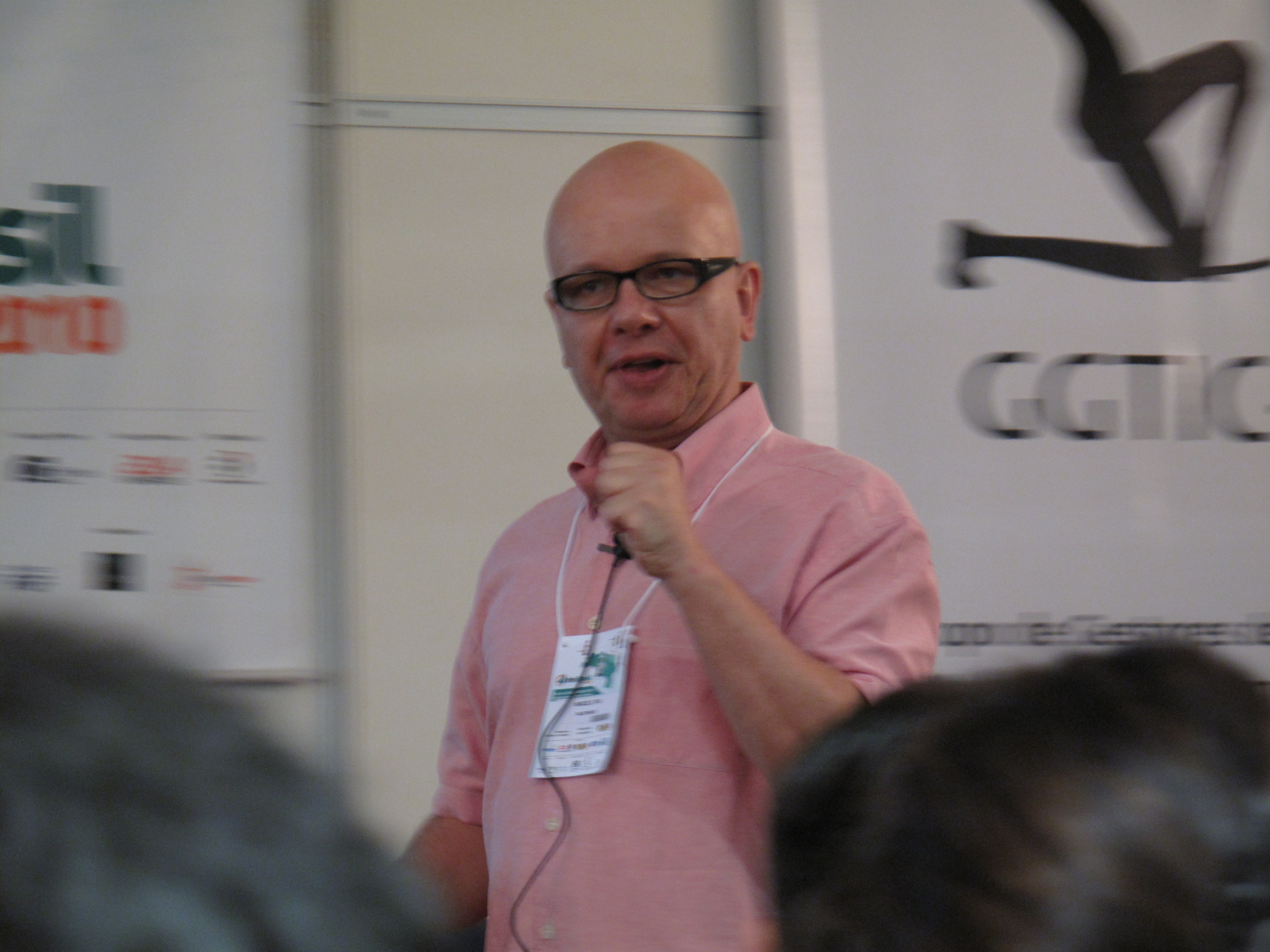 palestra do Marcelo Tas na Infobrasil 2010.